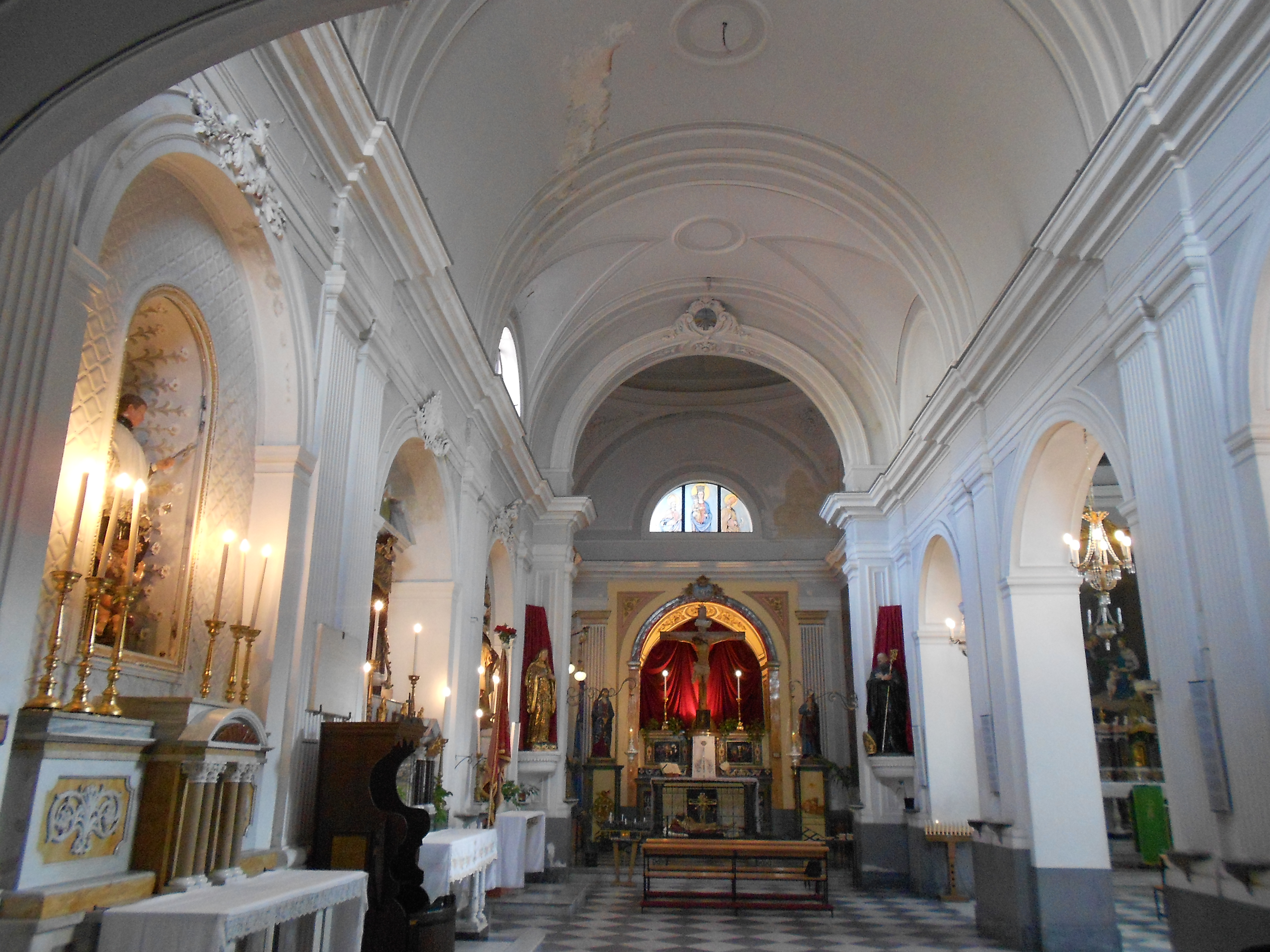 Chiesa Madre di Santa Maria di Licodia